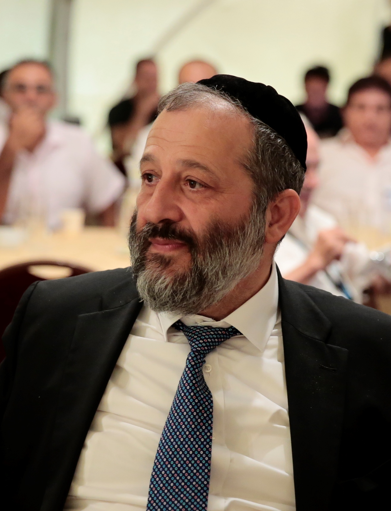 אריה דרעי במהלך ביקור בנצרת